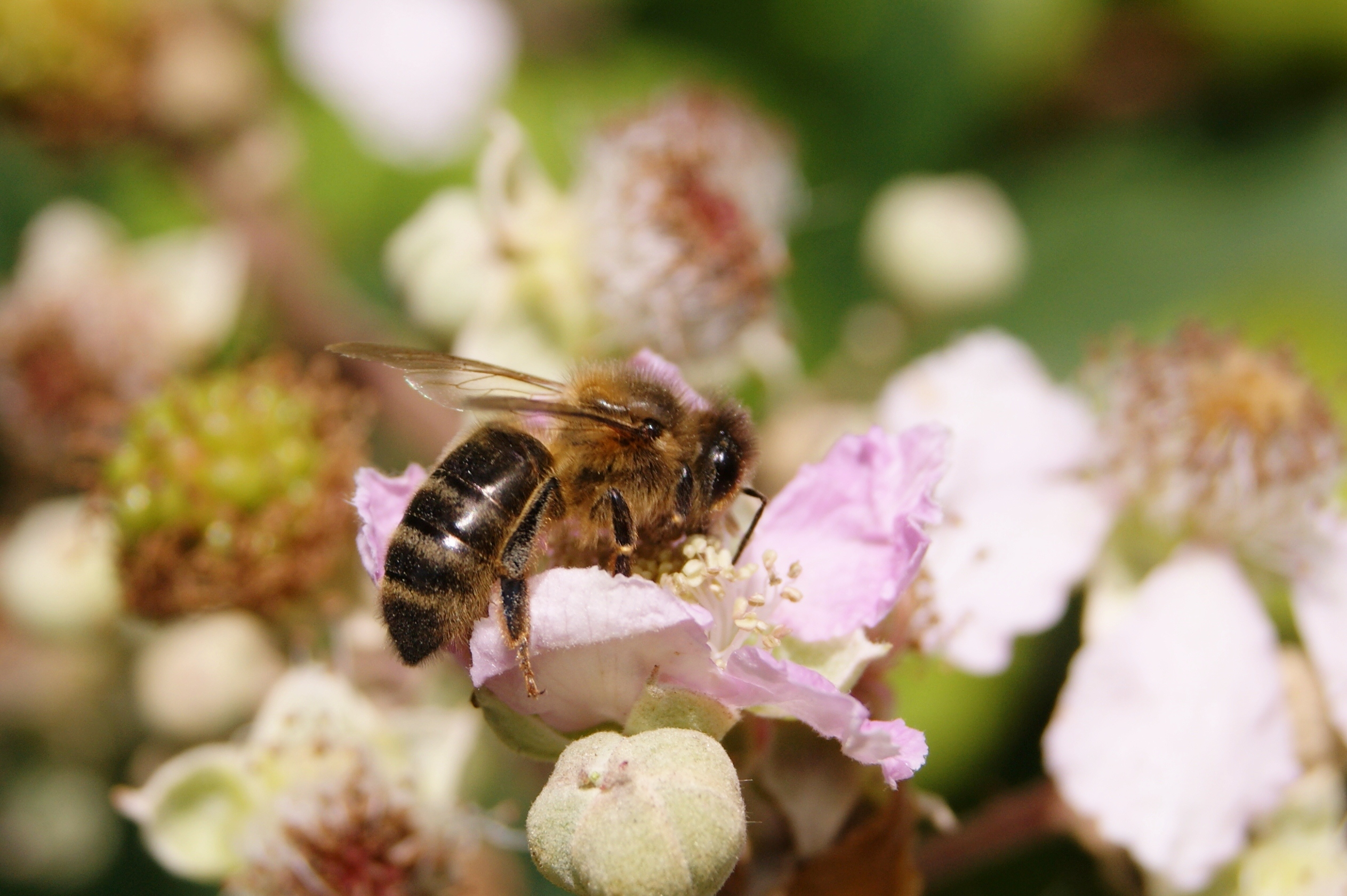 abeille qui butine des fleurs